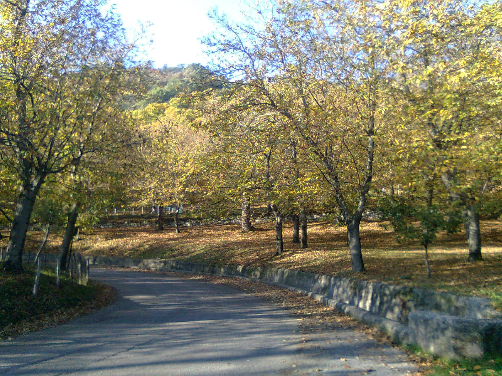 Uno scorcio del bosco di castagni presente a Roccadaspide